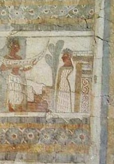 Museu arqueològic de Creta a Heràkleion